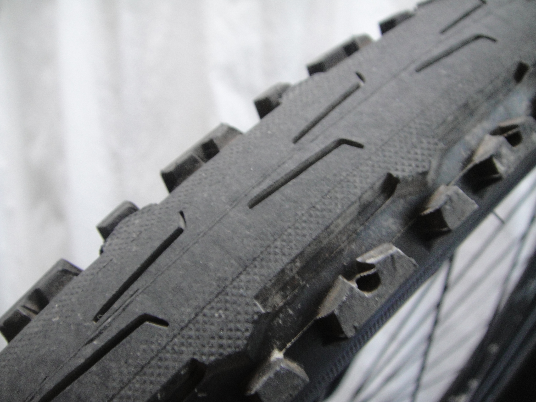 自転車用セミスリックタイヤ